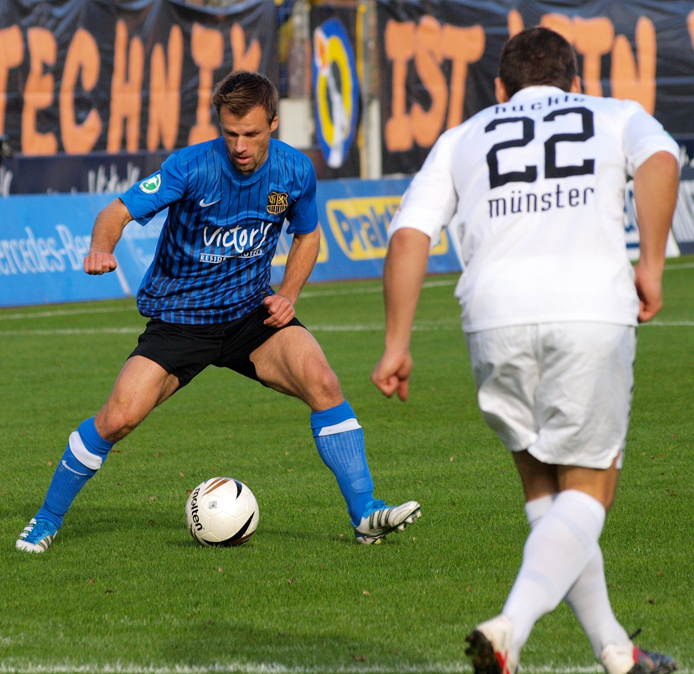 Martin Forkel (links) behauptet den Ball in einem Zweikampf.